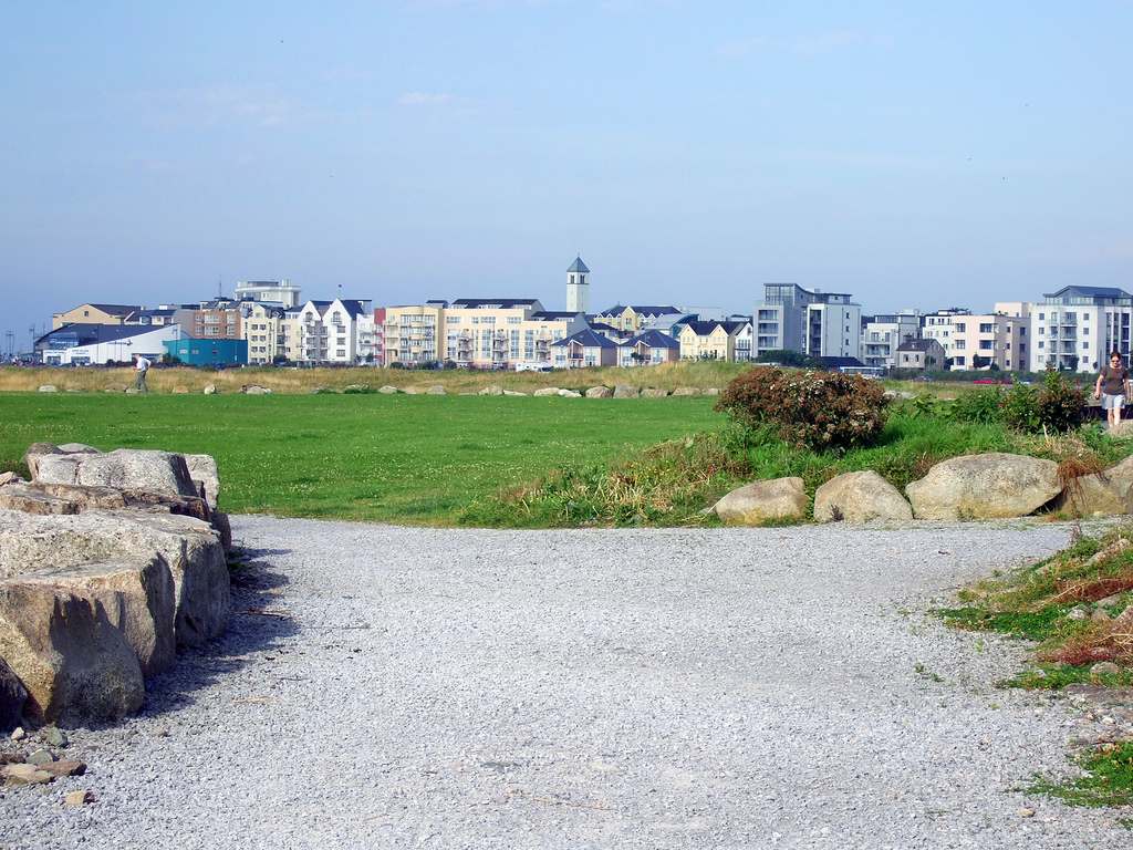 Das Foto wurde von Manuela gemacht